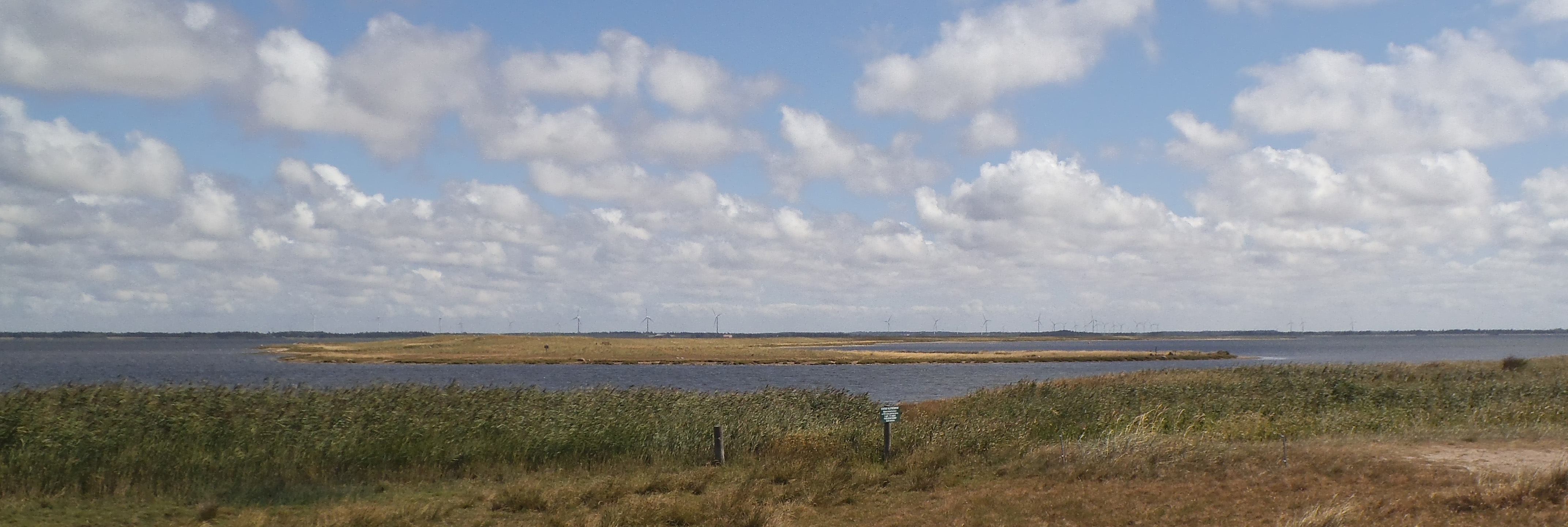 Fjandø, Nissum Fjord, Danmark, 2018